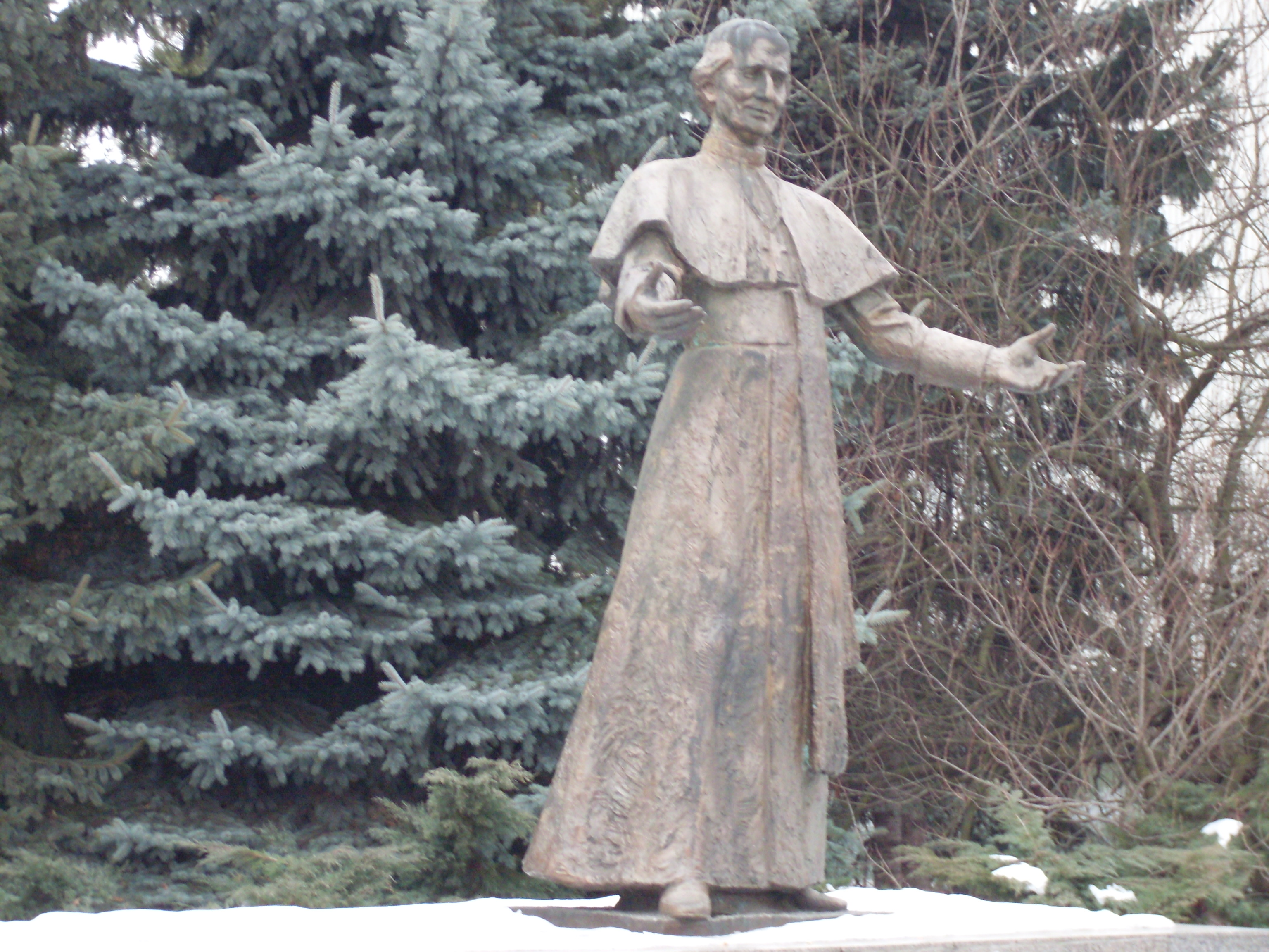 Fotky z mesta Žilina